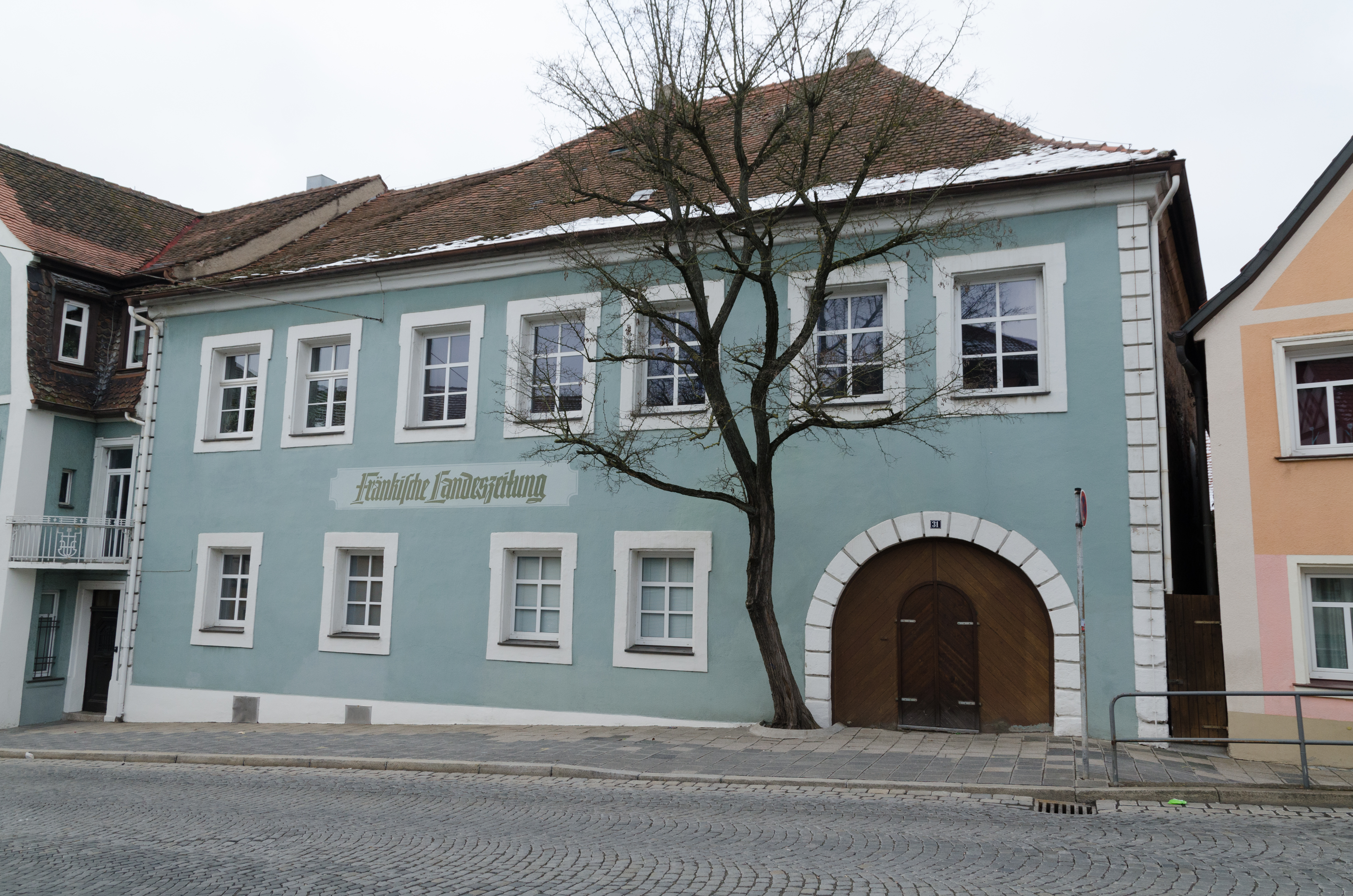 Neustadt an der Aisch, Nürnberger Straße 31